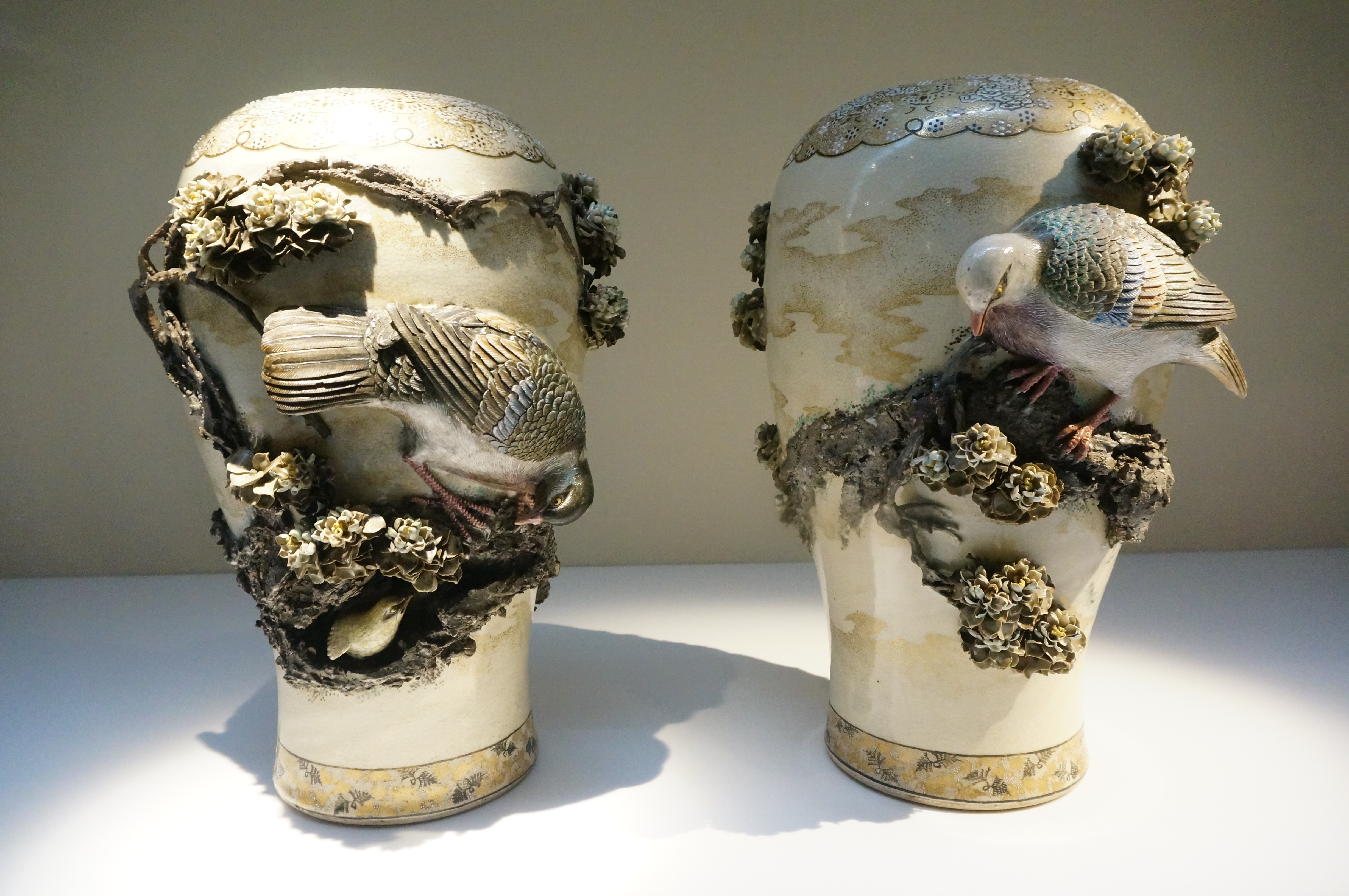 東京国立近代美術館工芸館「名工の明治」展にて